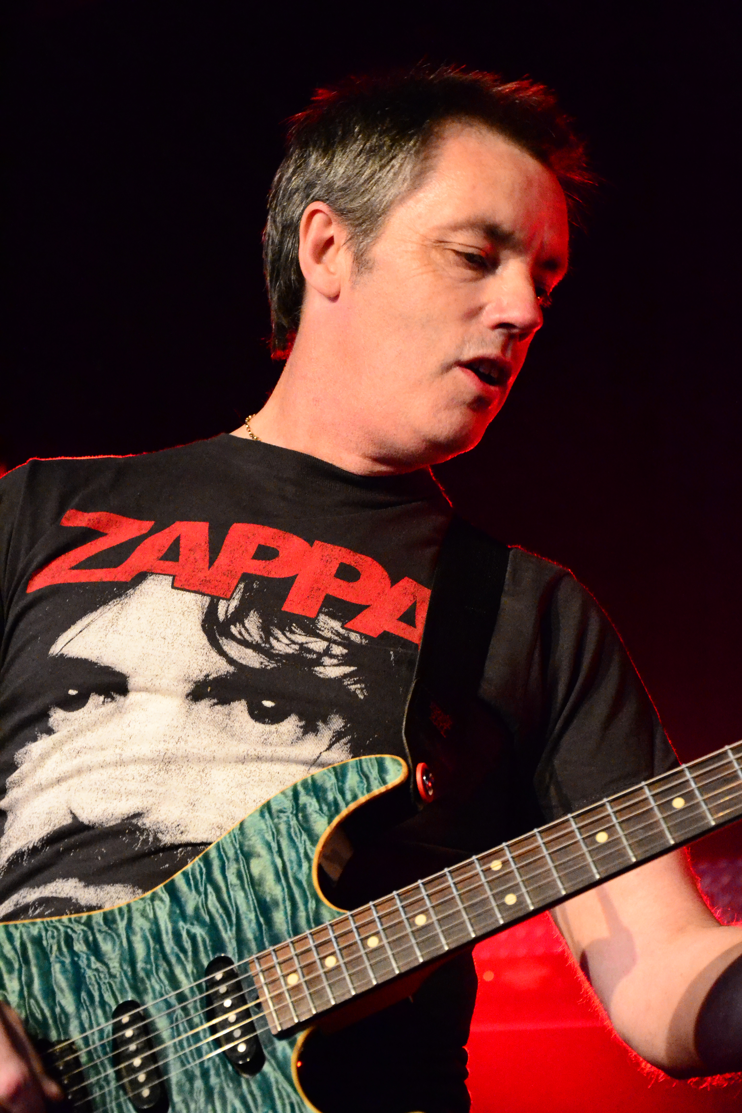 Adrian Mills von Diamond Head beim Headbangers Open Air 2014